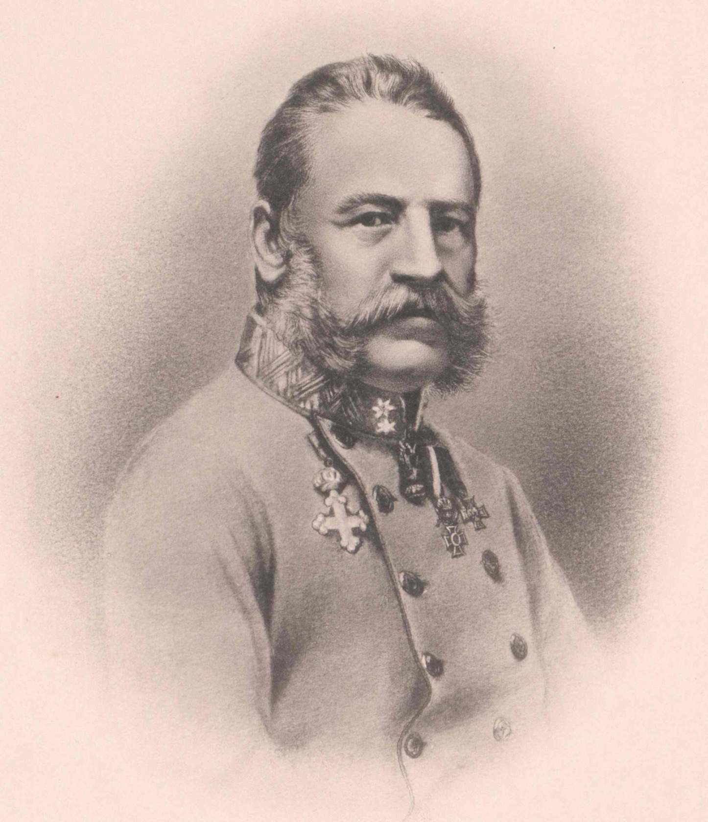 Karl Moering (* 19. Mai 1810; † 26. Dezember 1870), österreichischer Offizier und Abgeordneter des Frankfurter Parlaments 1848.